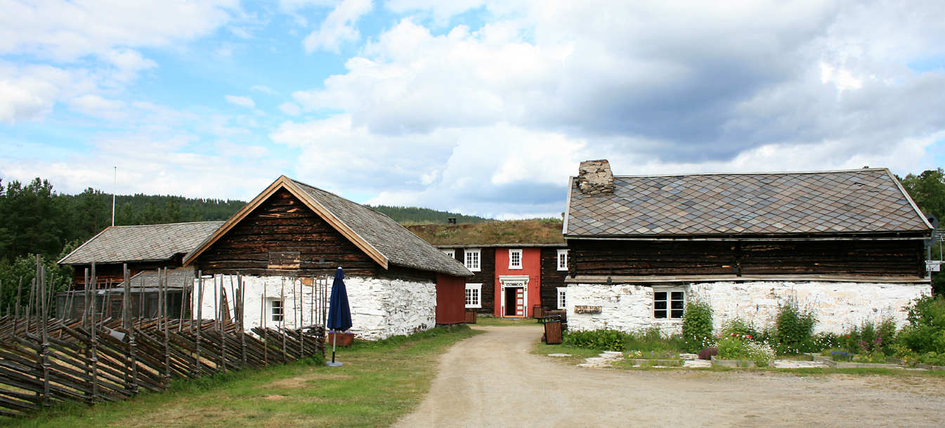 Dølmotunet gardsmuseum, Tolga.